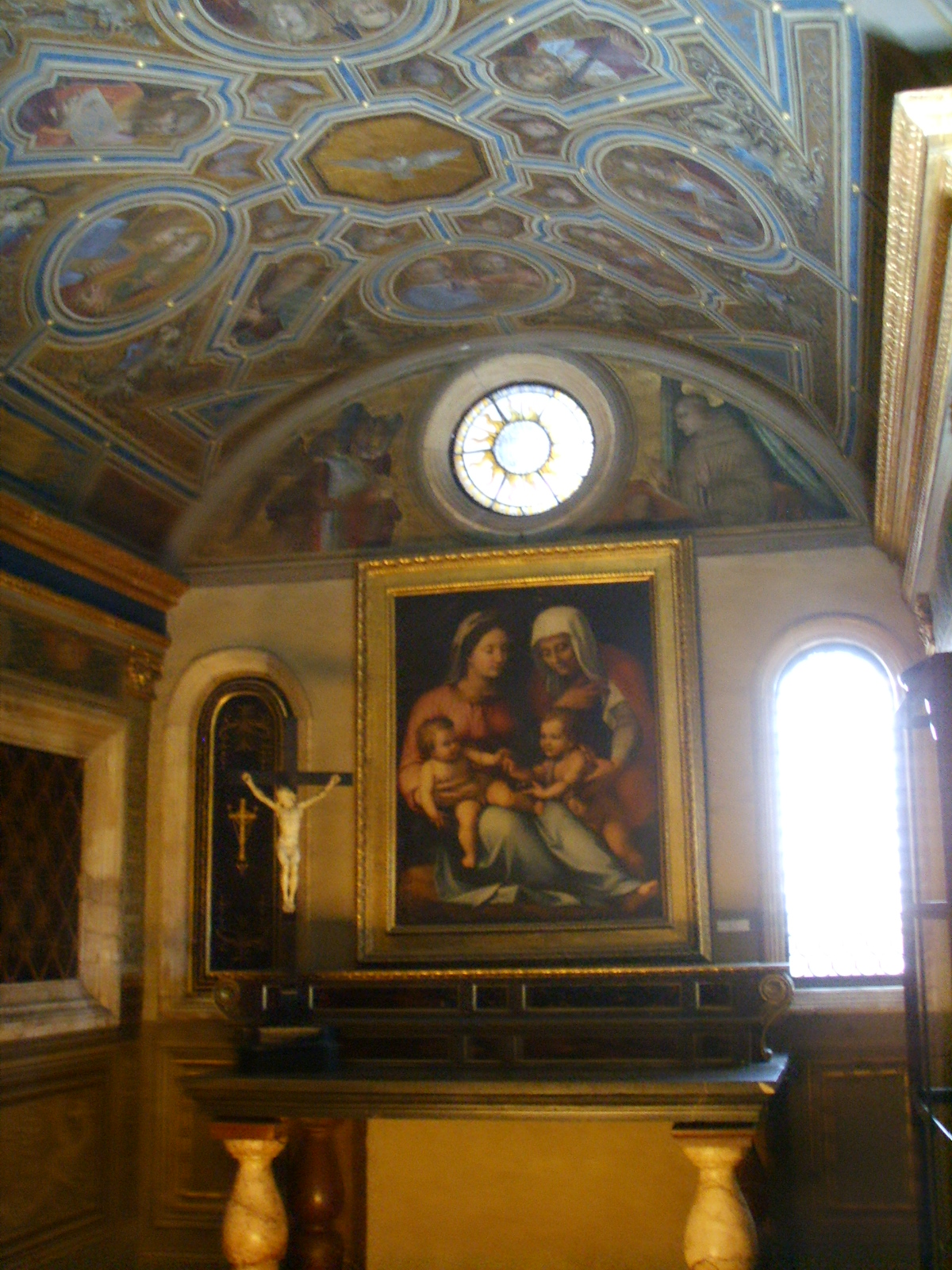 Cappella della Signoria, ridolfo del ghirlandaio 02 e sacra famiglia di Mariano Graziadei da Pescia